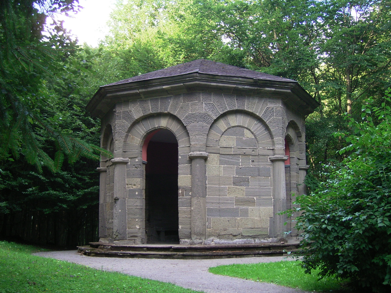 Beschreibung: Bergpark Wilhelmshöhe (Kassel), Felseneck, 2005 Quelle: selbst photographiert Fotograf oder Zeichner: Benutzer:Hafenbar